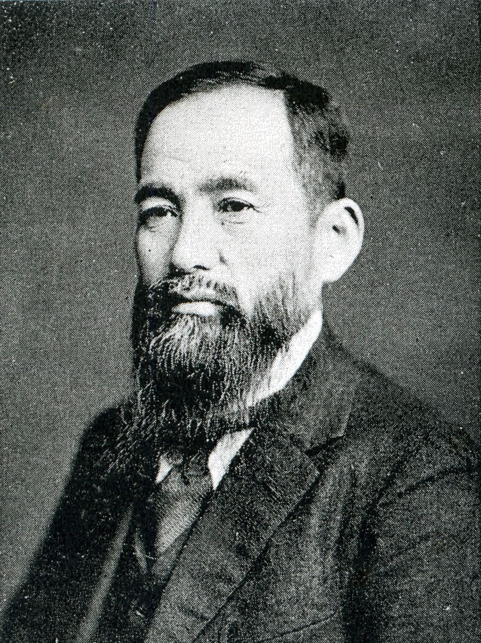 この写真は、高田耘平（1873-1957）の写真です。